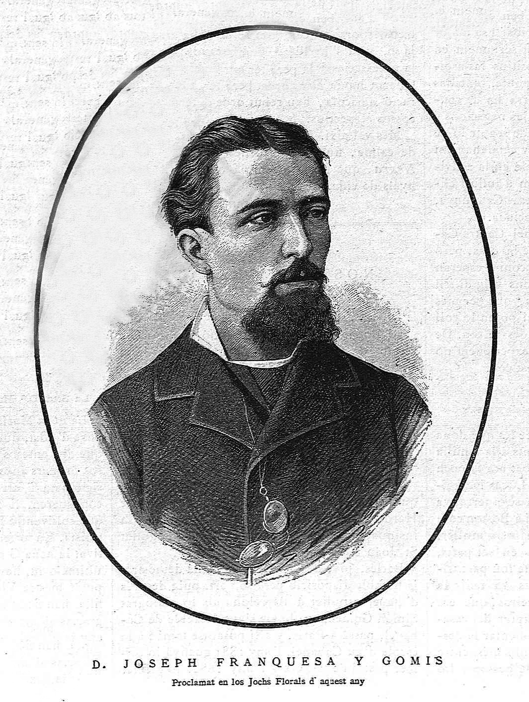 Joseph Franquesa y Gomis.